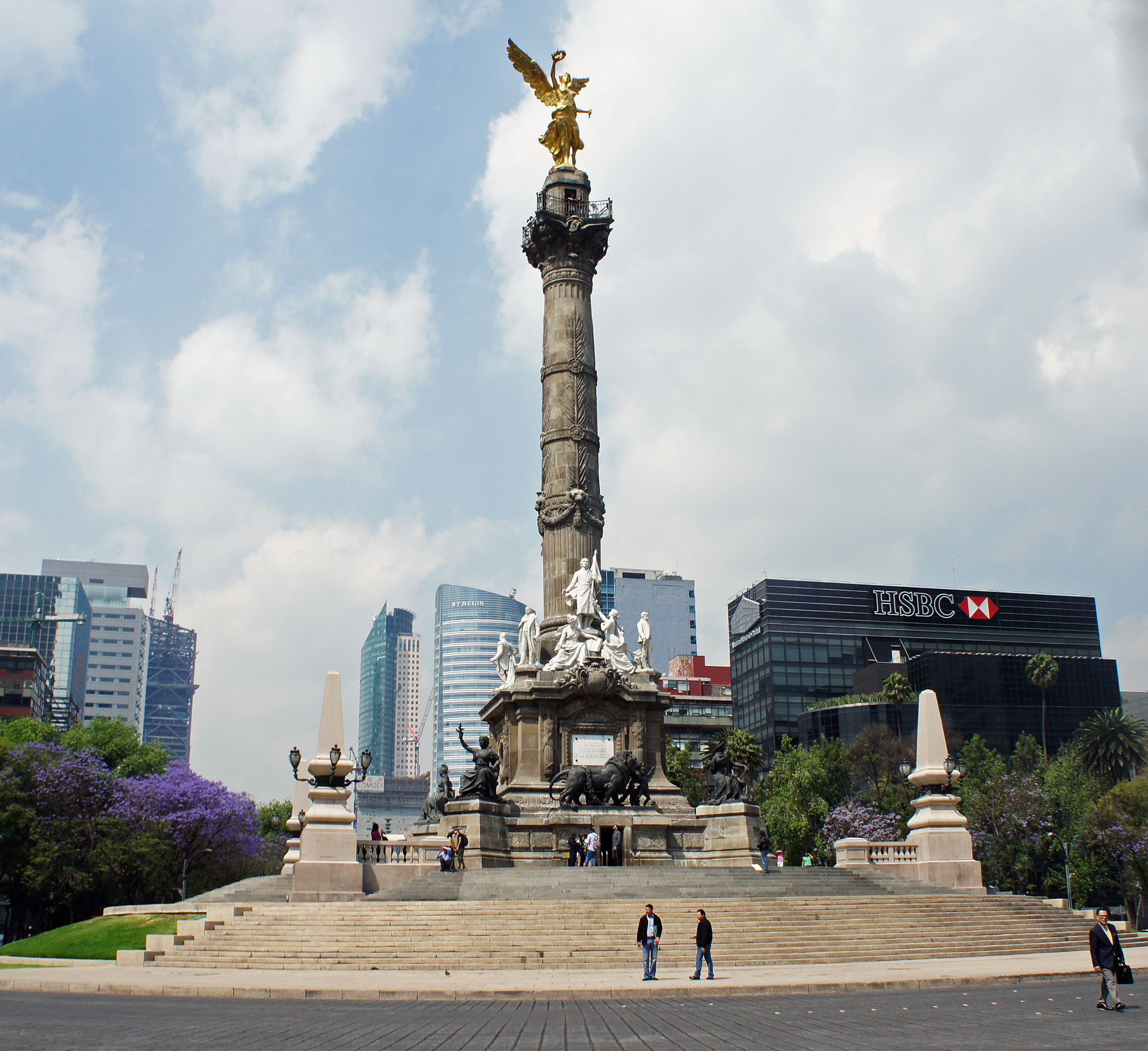 Monumento de la Independencia, México DF